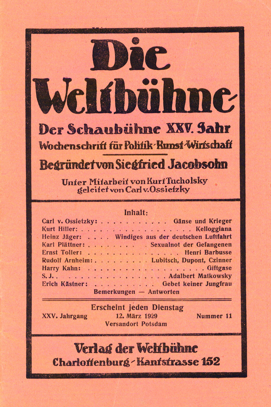 Cover of "Die Weltbühne", german journal